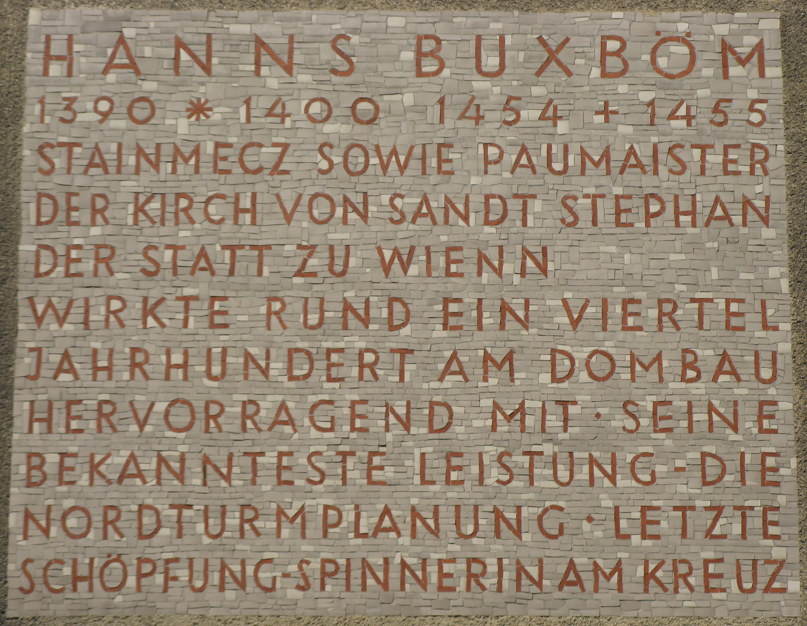 Sgraffito Hans Buxböm, Puchsbaumgasse 60, Wien-Favoriten